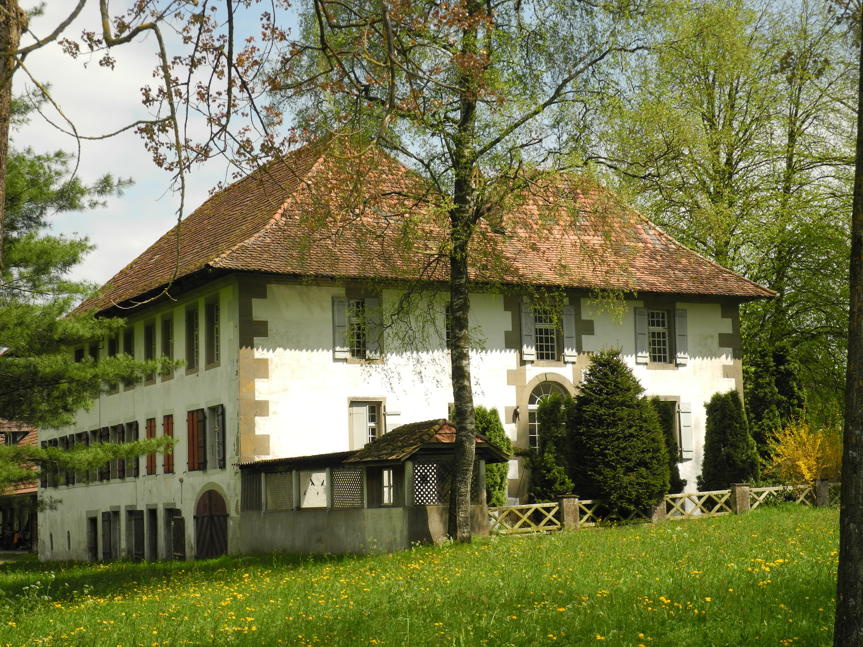 Schlössli Heimenhaus, Nordwestecke